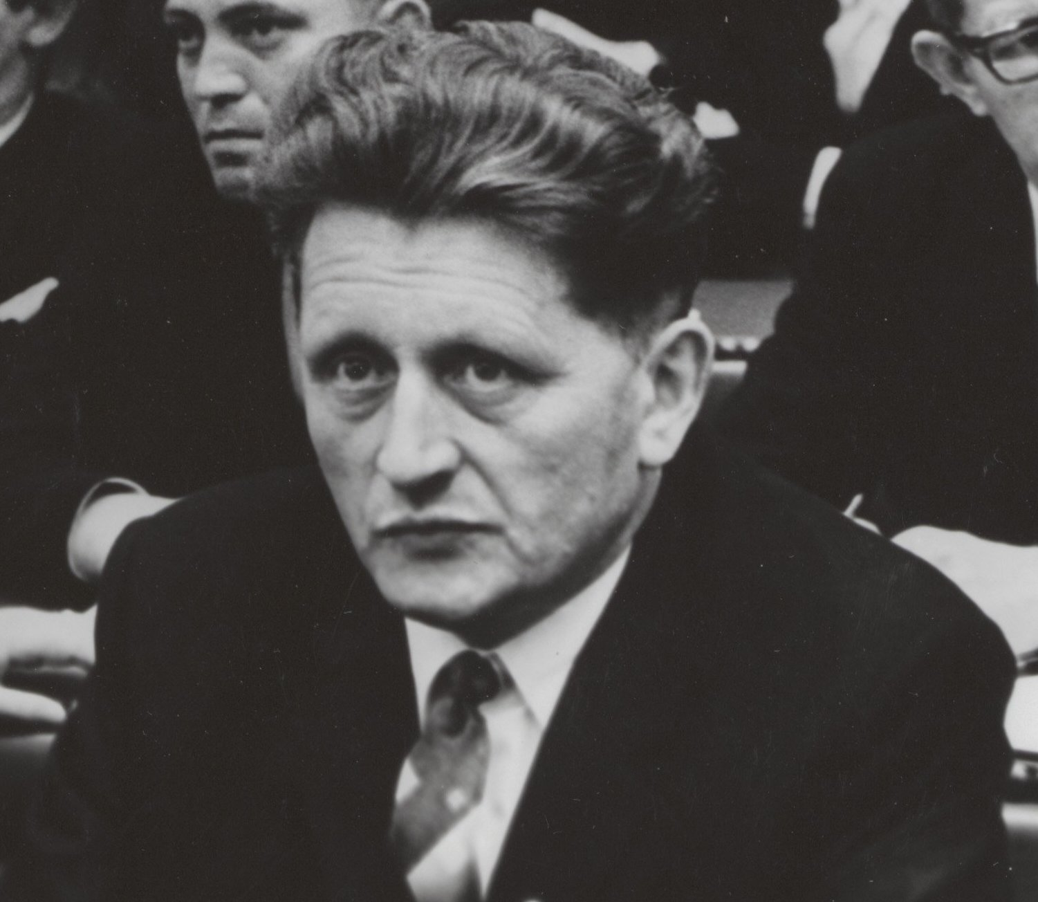 Collectie / Archief : Fotocollectie Elsevier Reportage / Serie : [ onbekend ] Beschrijving : tweede kamer, kamerleden, partijen, Boerenparty, Brake, Koekoek,h, Nuyens, Randwyck,v. Datum : 23 februari 1967 Locatie : Den Haag, Zuid-Holland Trefwoorden : kamerleden, partijen, tweede kamer Persoonsnaam : Boerenparty, Brake, Koekoek,h, Nuyens, Randwyck,v. Fotograaf : Fotograaf Onbekend / Anefo Auteursrechthebbende : Nationaal Archief Materiaalsoort : Foto (zwart/wit) Nummer archiefinventaris : bekijk toegang 2.24.05.02 Bestanddeelnummer : 091-0643